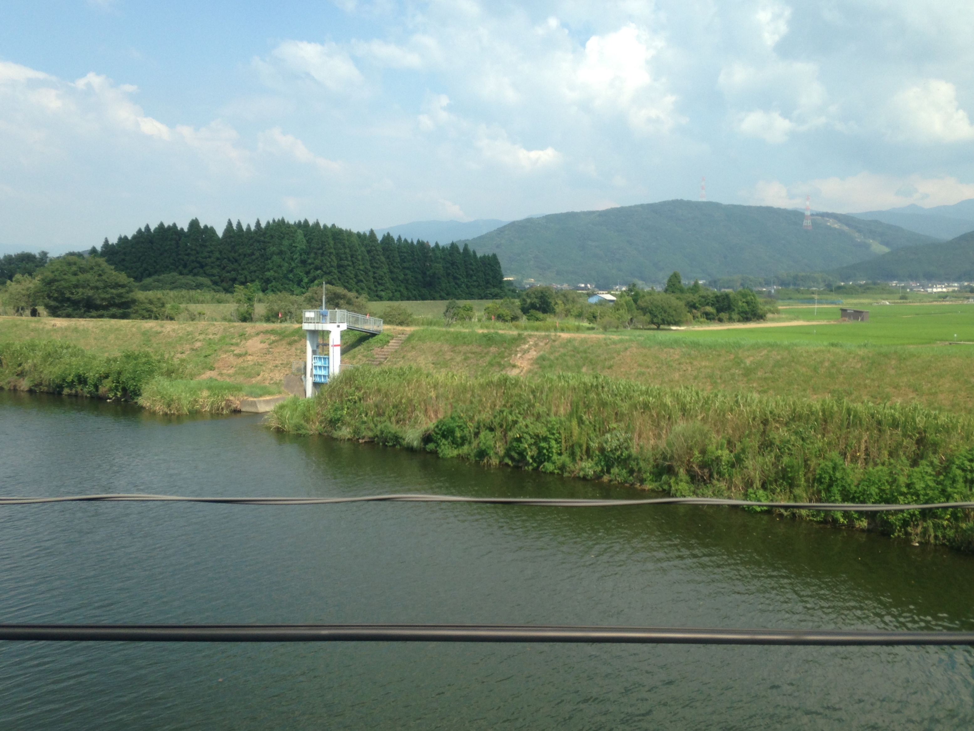 唐津線列車内より望む徳須恵川(下流側)と夕日山